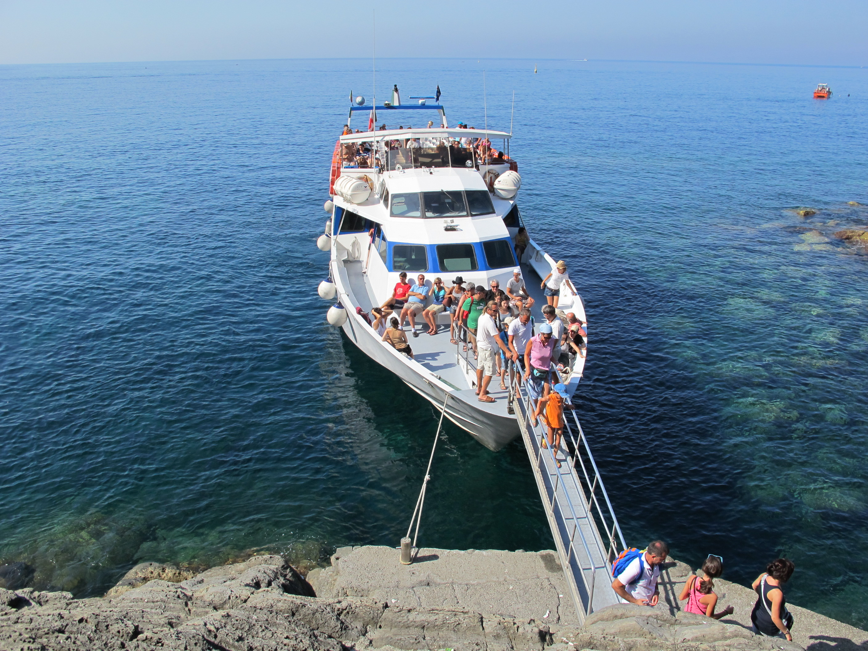 Riomaggiore, attracco nave